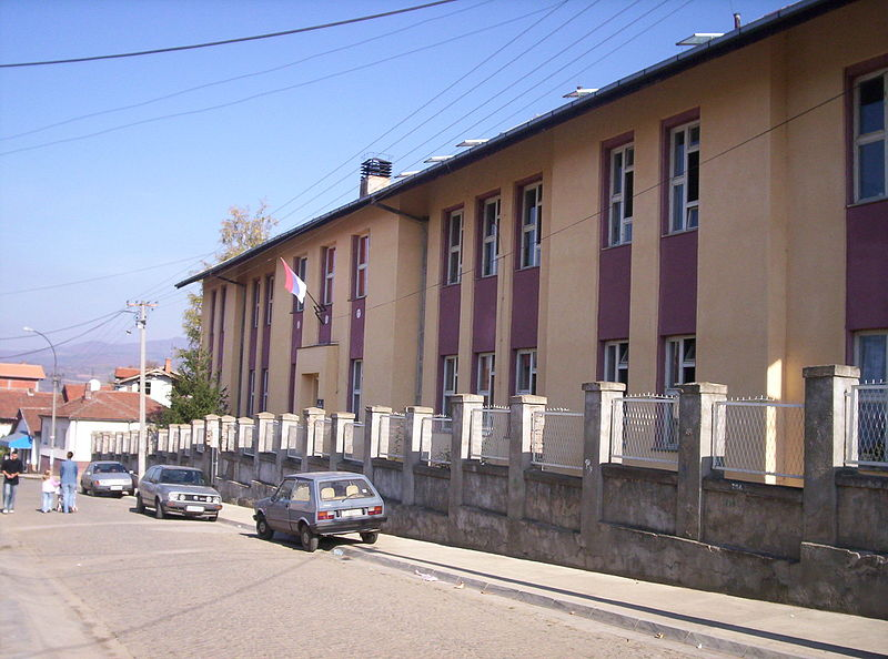 Власотинце Основна Школа "Синиша Јанић"